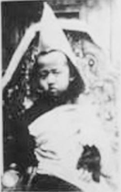 阿旺却吉旺其格，科尔沁右翼前旗葛根庙的第七世诺彦活佛，摄于坐床时